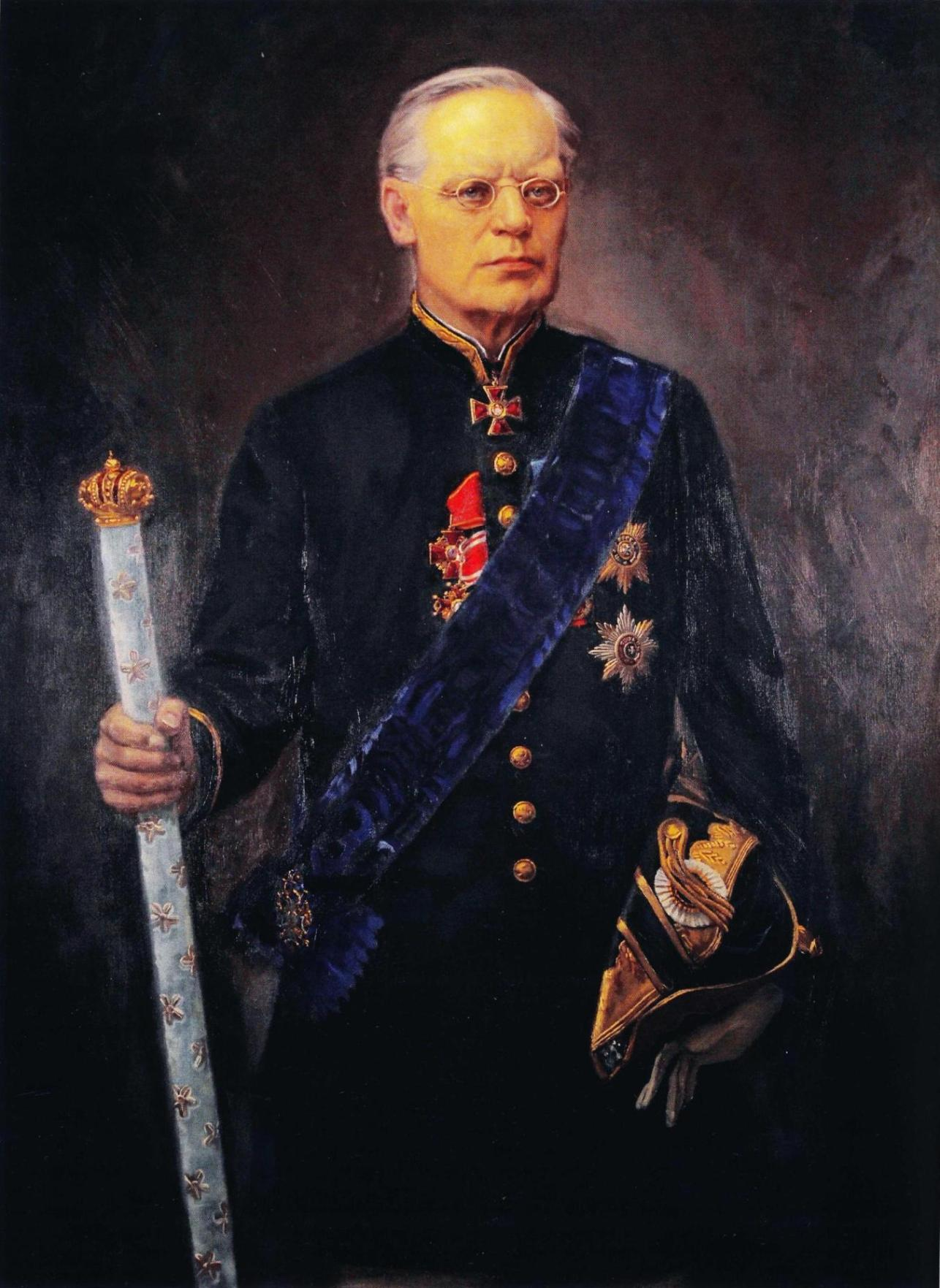 Maamarsalkka Lars Theodor von Hellens (1826–1896), aatelissäädyn tilaama postuumi muotokuva vuodelta 1900. Omistaja Ritarihuone.